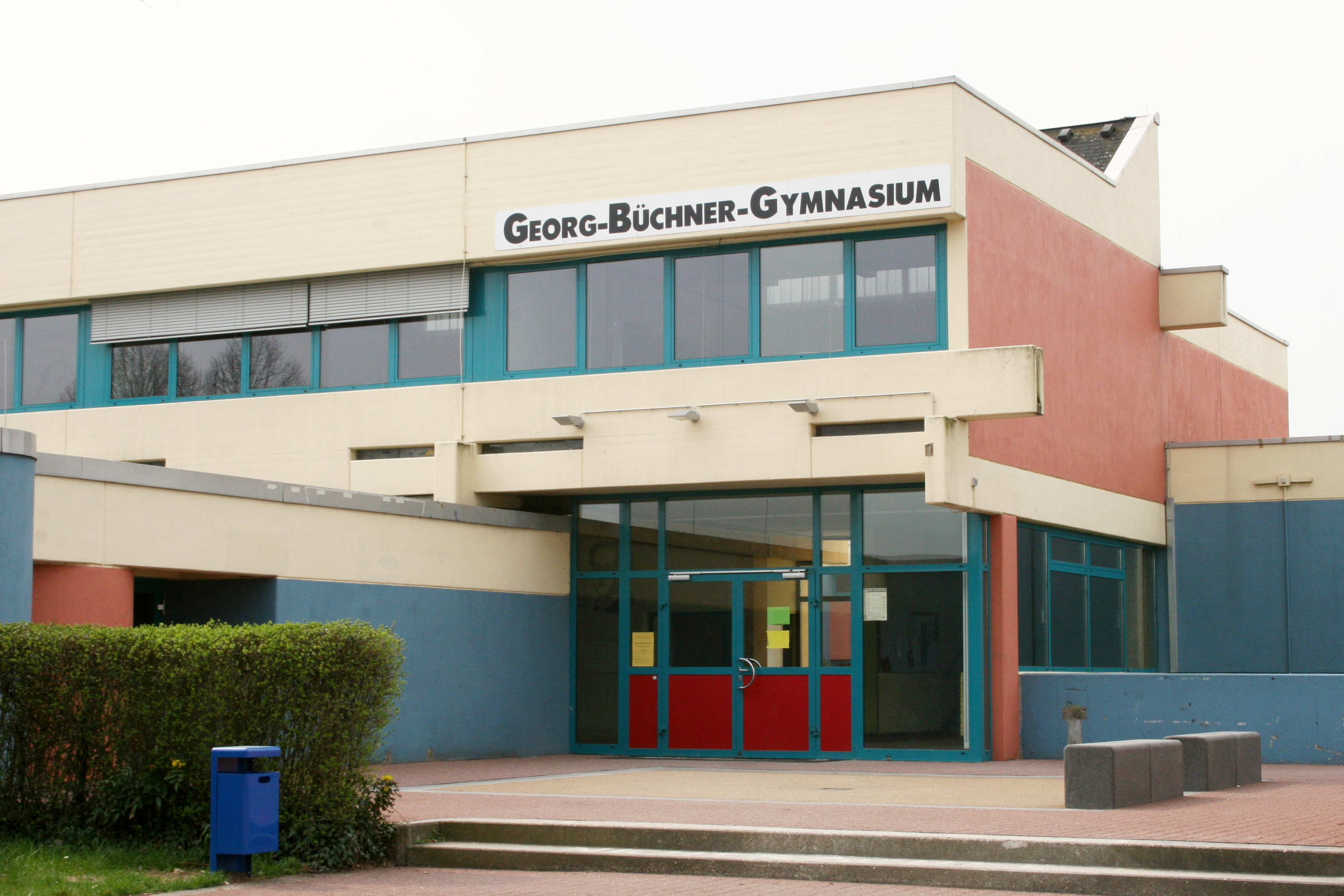 Haupteingang des Georg-Büchner-Gymnasiums in Bad Vilbel